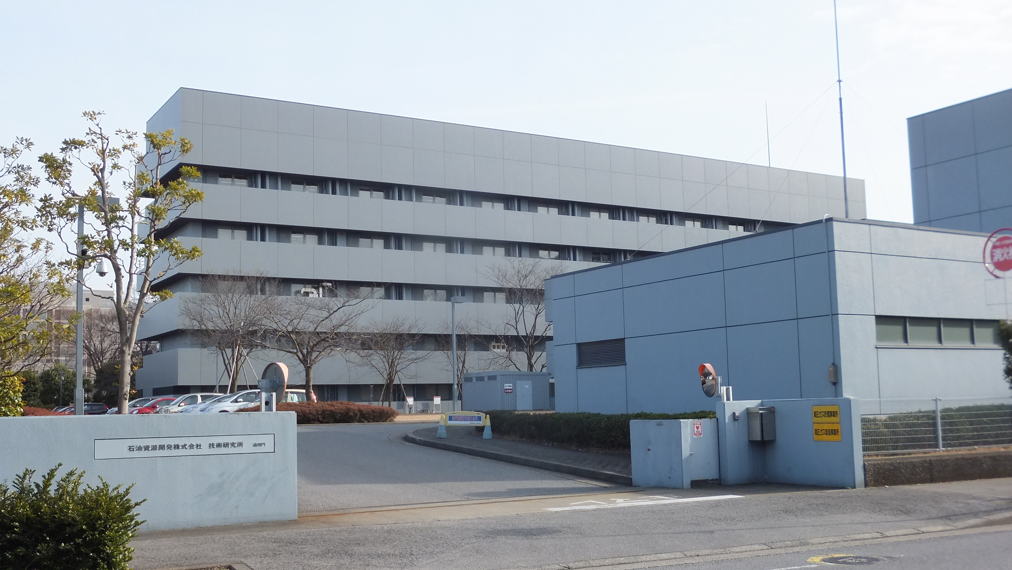 石油資源開発株式会社 技術研究所（千葉市美浜区）